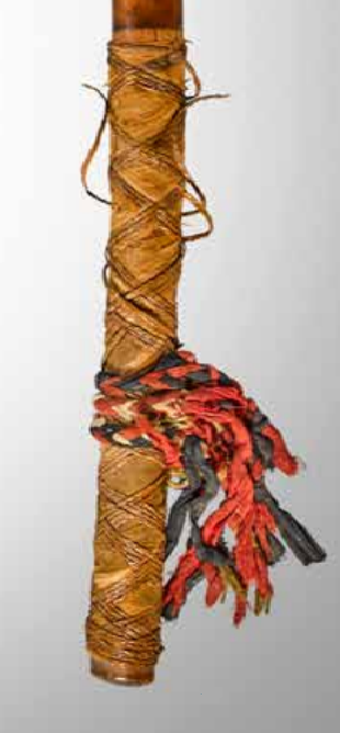 Manche décoré club kanak